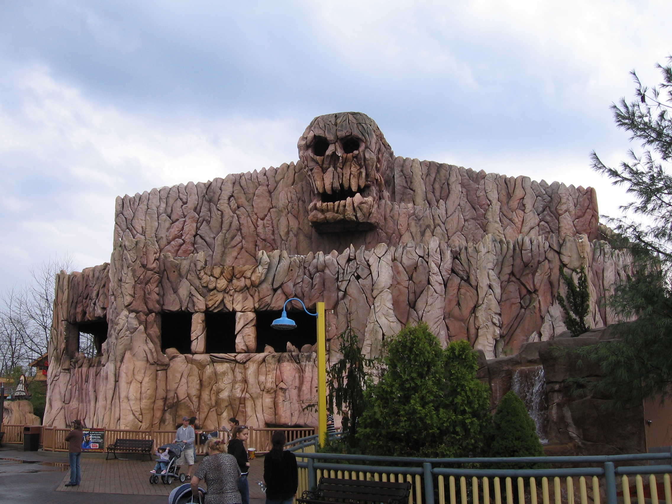 Took it myself. Dusso Janladde 23:26, 8 April 2006 (UTC)